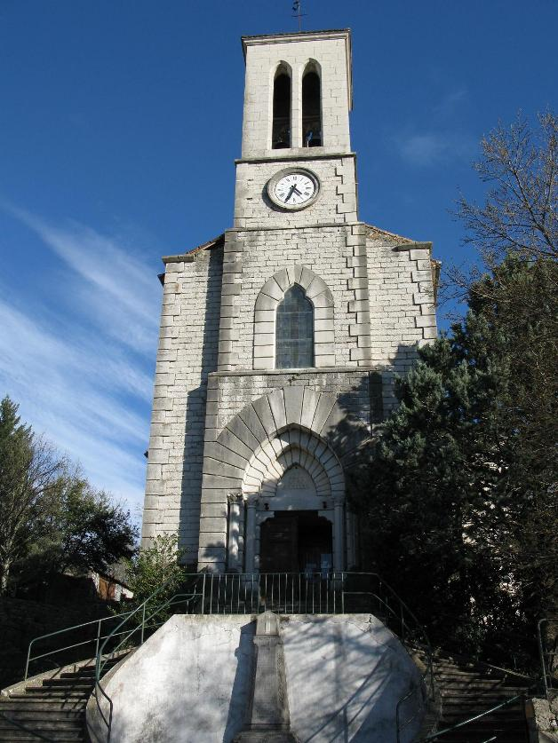 Balazuc